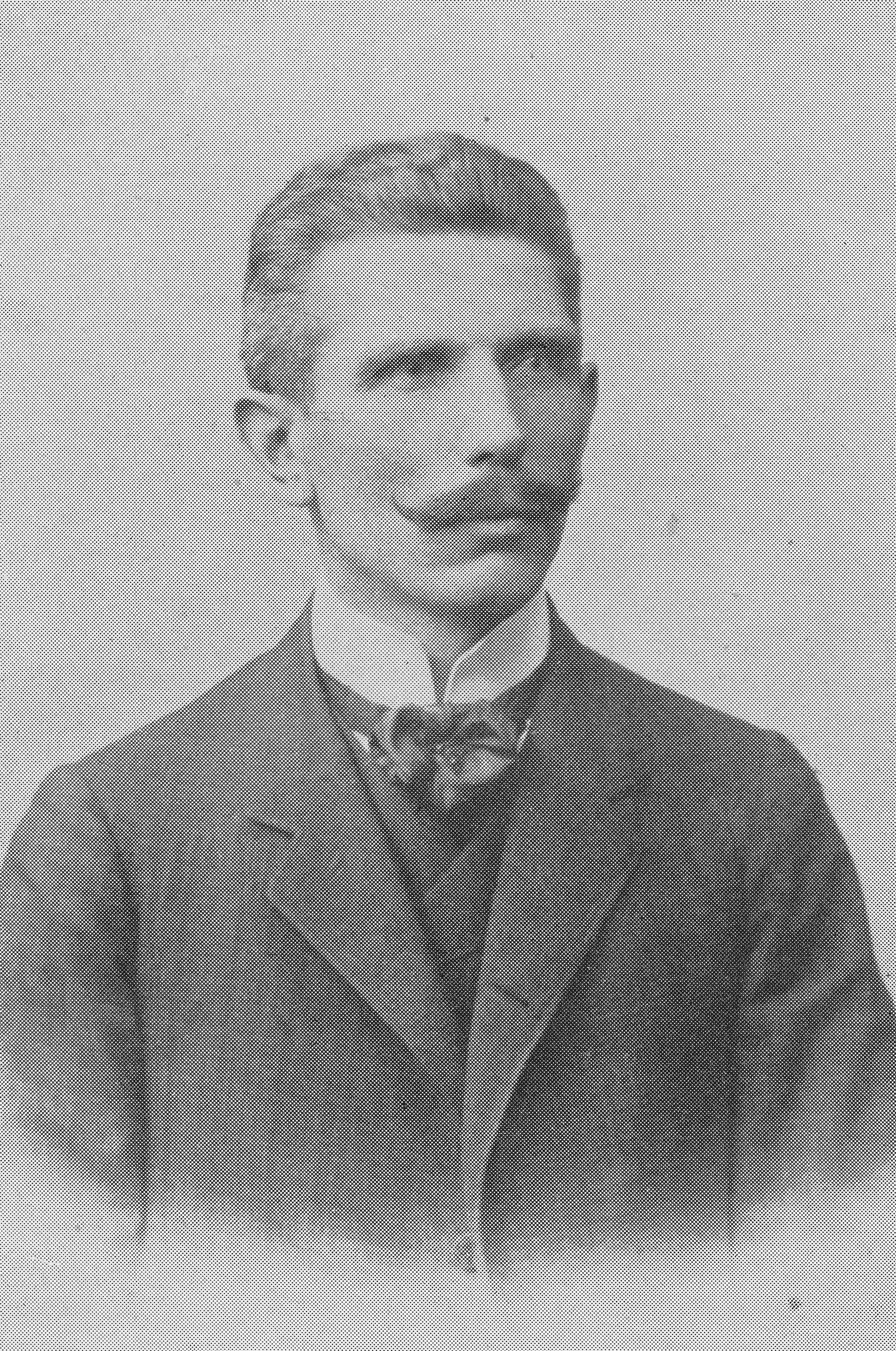 Adolph Schulze, deutscher Sportjournalist, 1852–1912